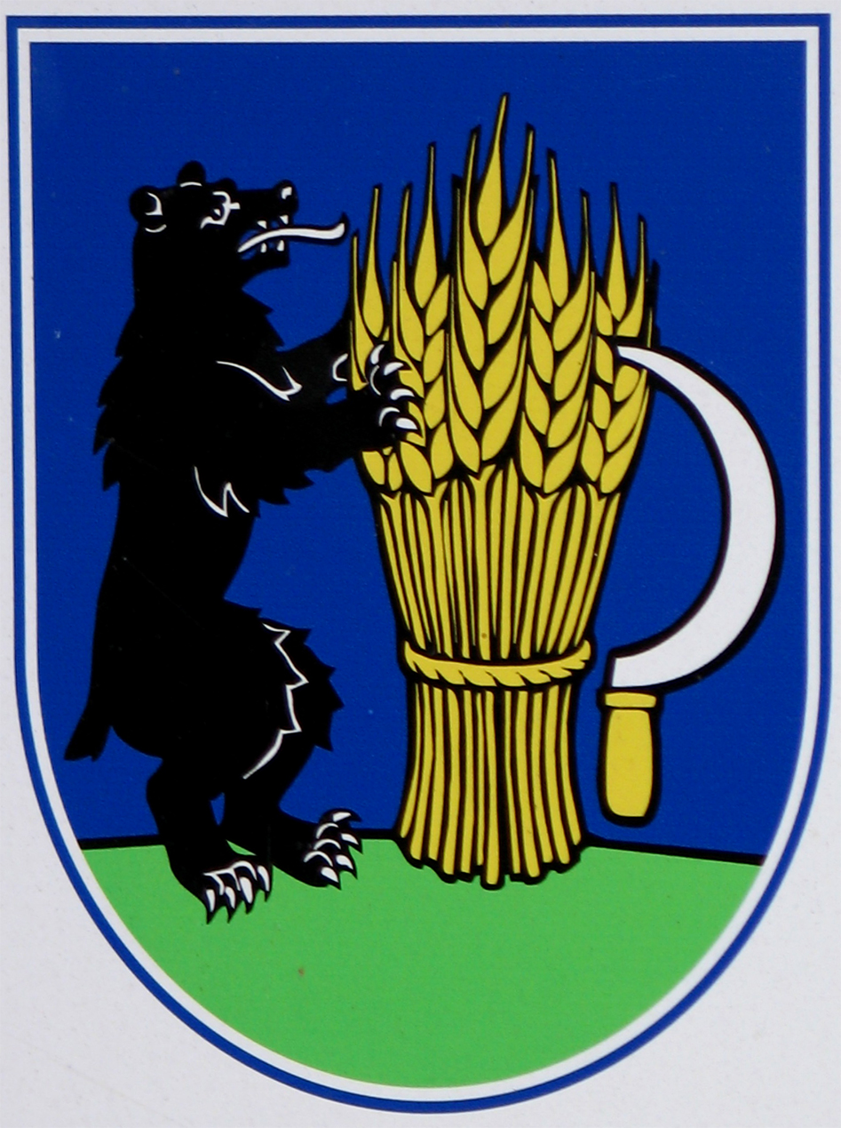 Erb obce Šemetkovce